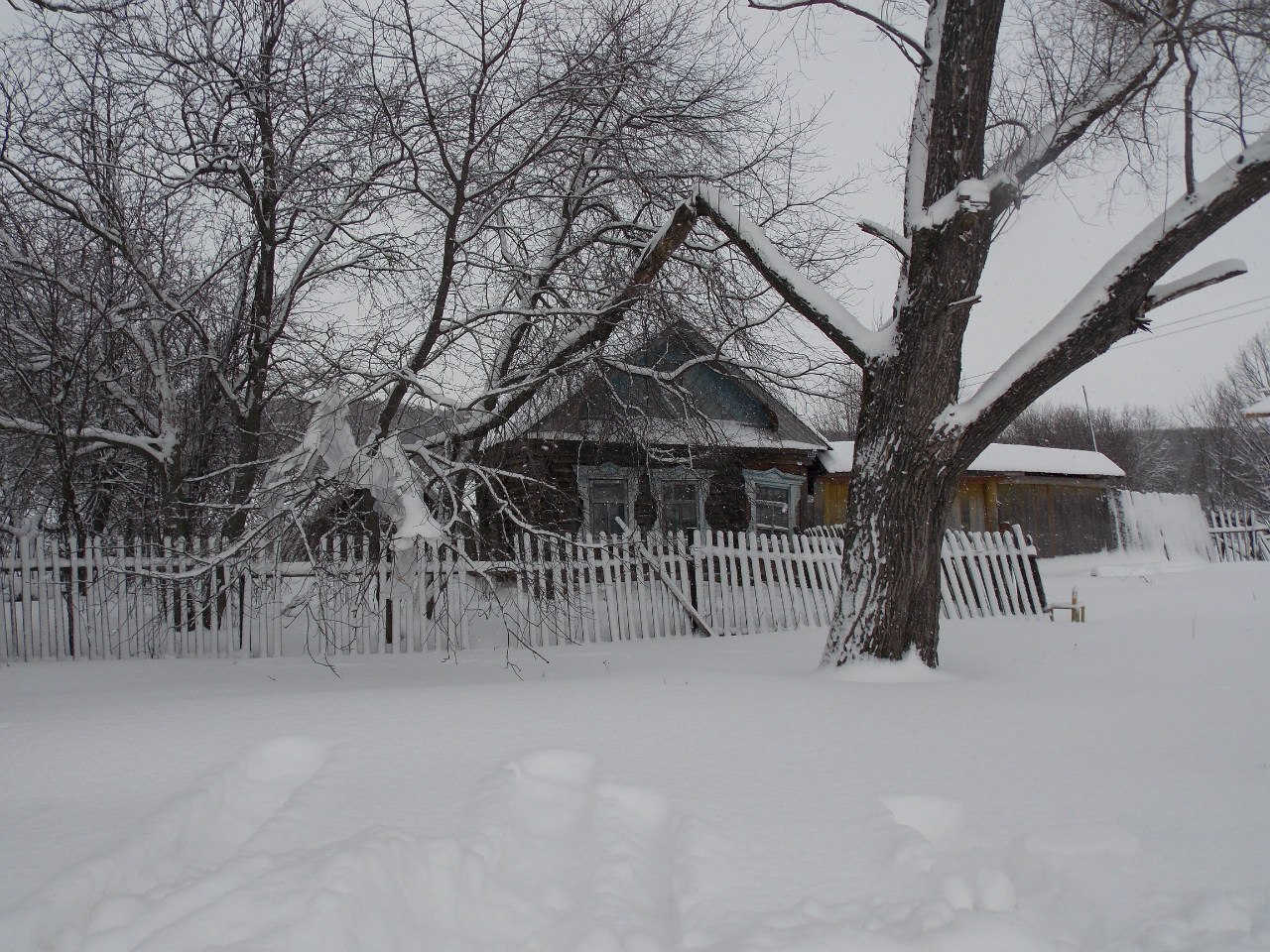 Дом в Алшихово